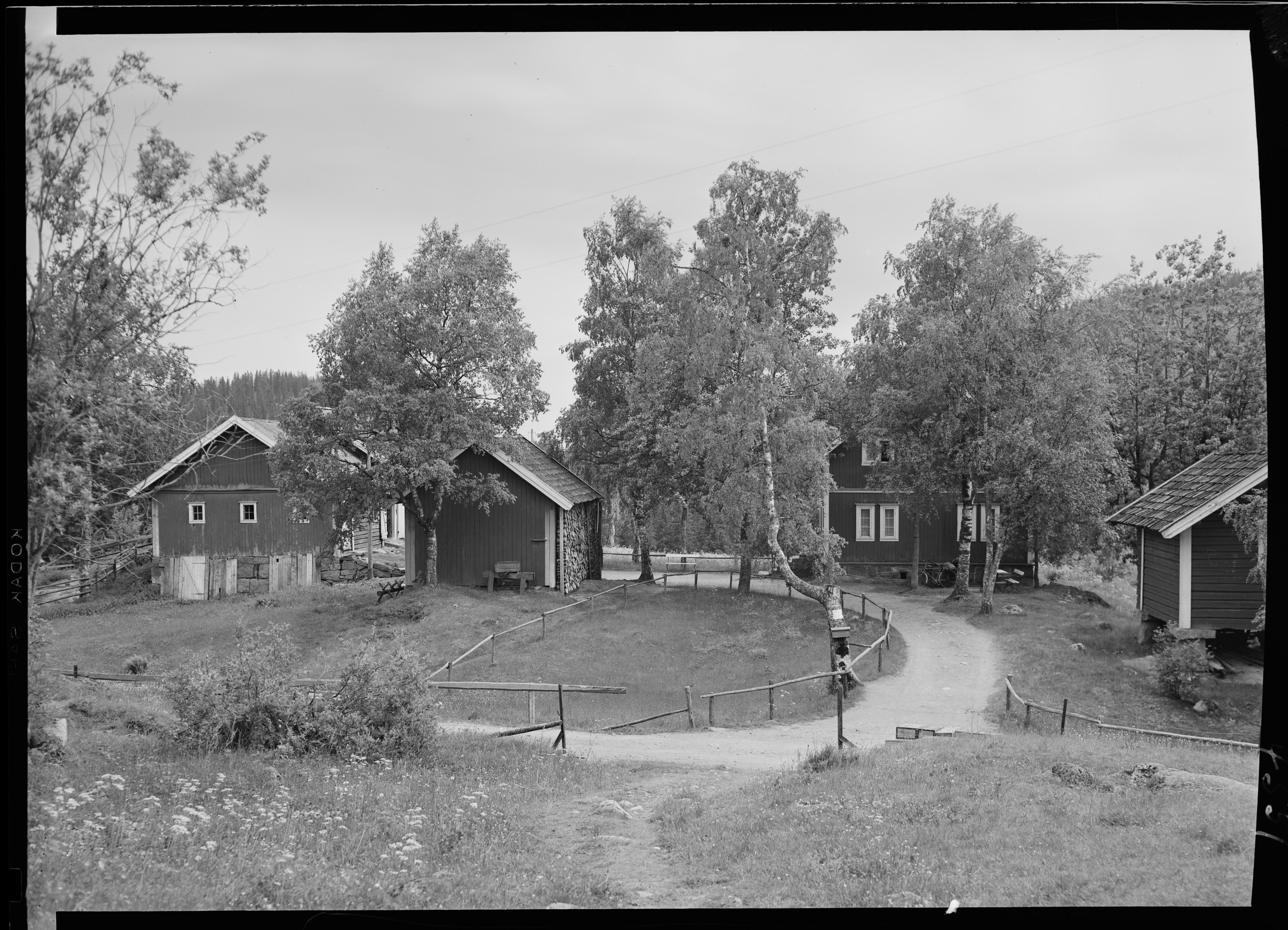 Bildet er hentet fra Nasjonalbibliotekets bildesamling. Anmerkninger til bildet var: Fotograf : ukjent Bjørnholt,Nordmarka, Oslo, Oslo